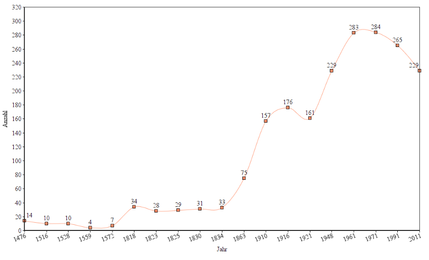 Srpski (latinica): broj domaćinstva u Zarožju